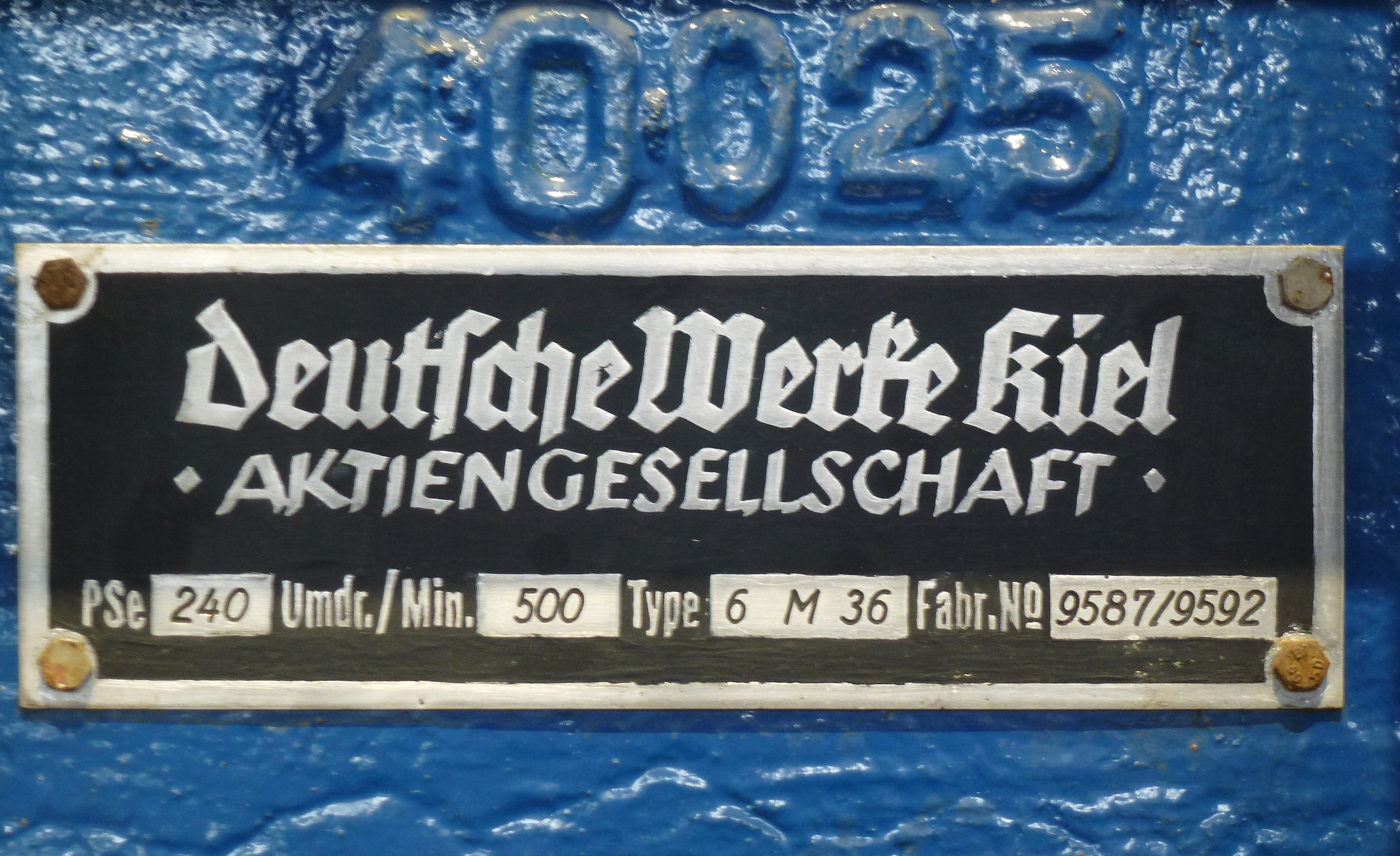 Typenschild auf einem Schiffsdiesel der Deutsche Werke Kiel im Schifffahrtsmuseum Kiel